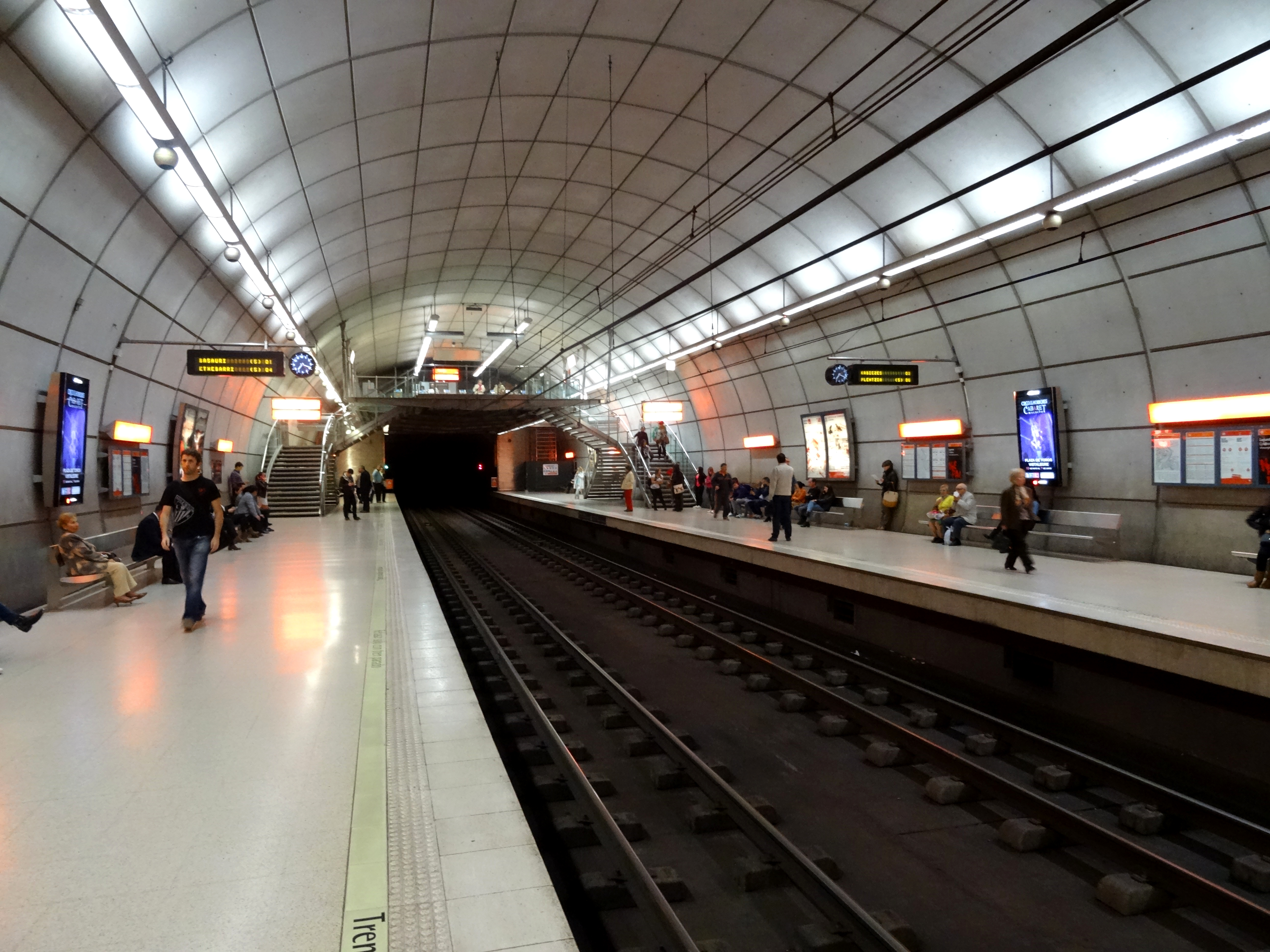 Bilbao - Metro - Mouya